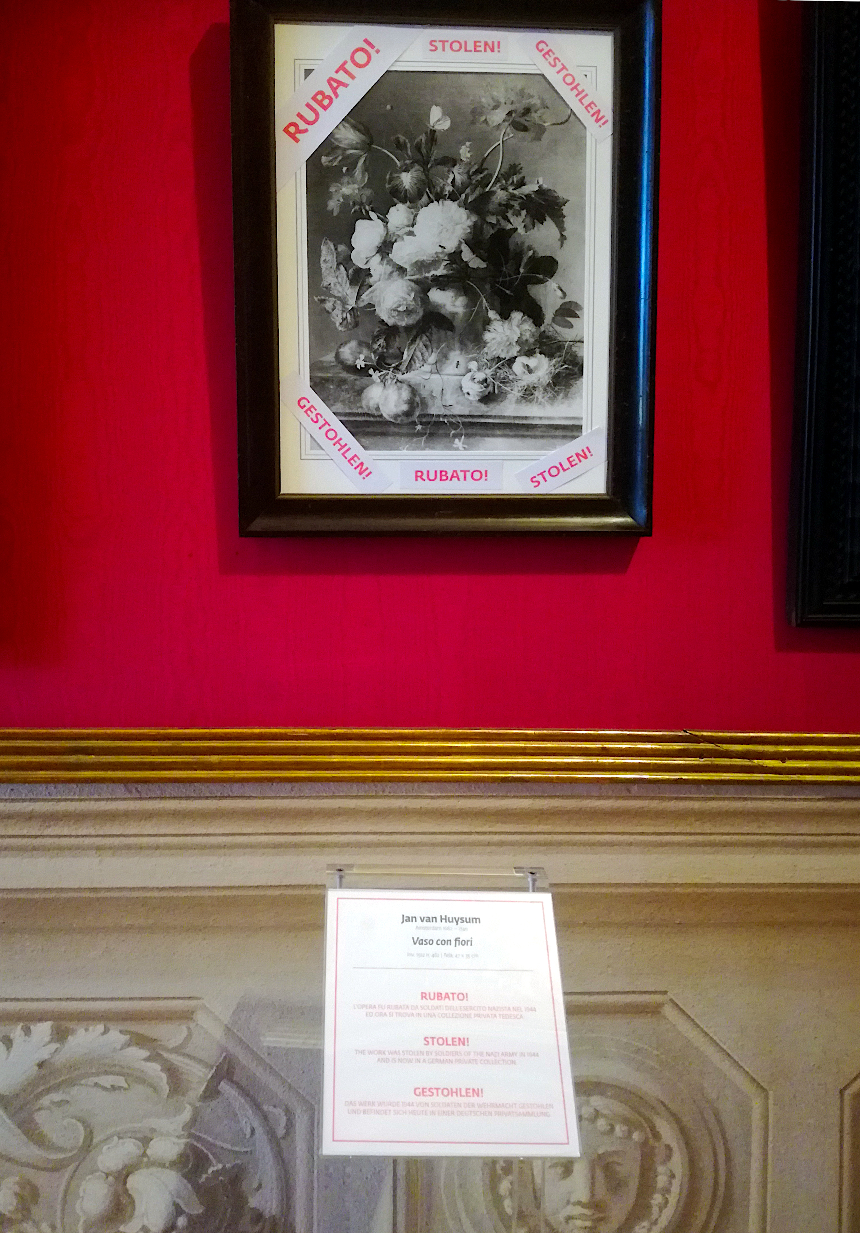 Quadro